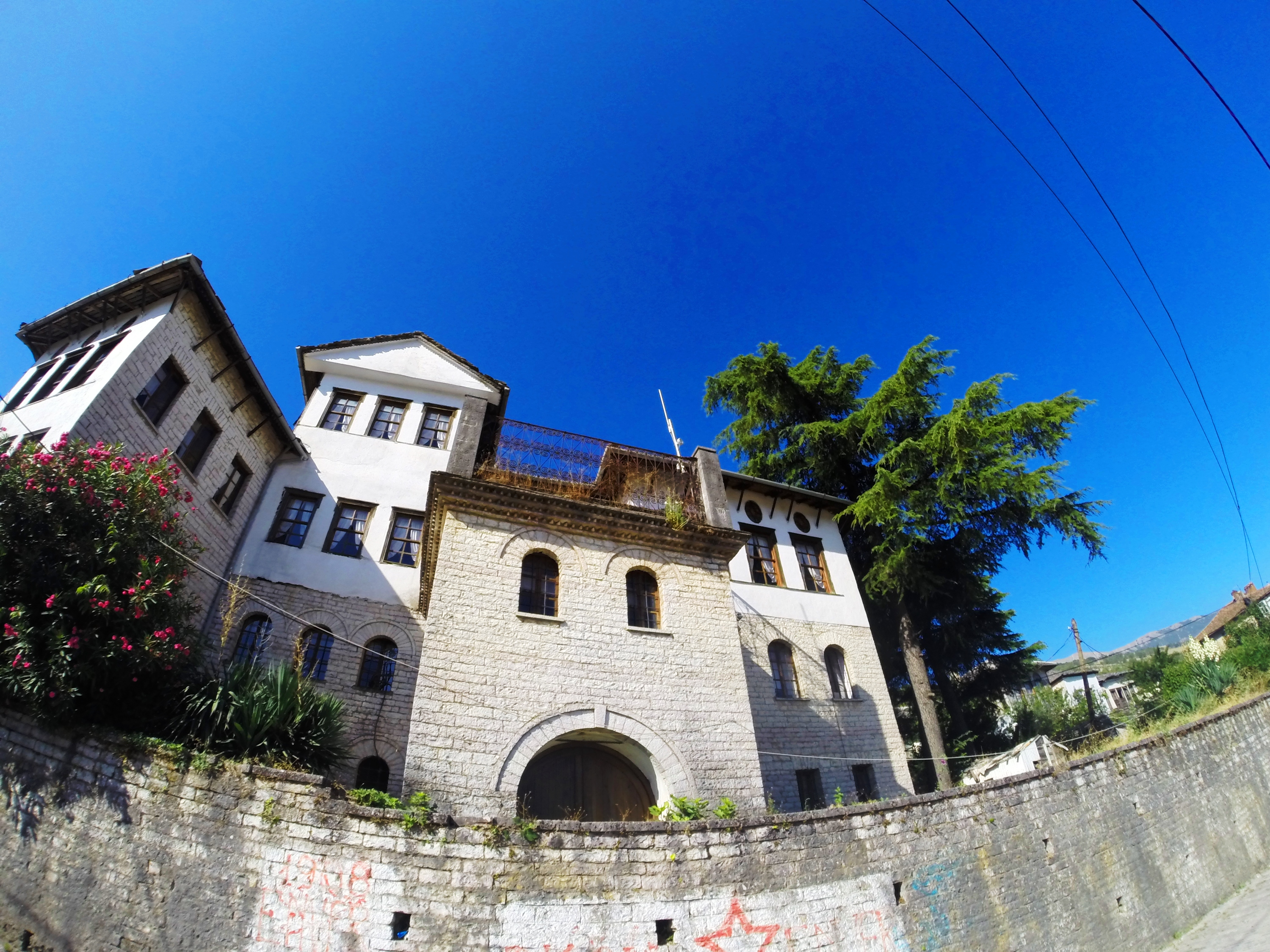 Shtëpia e enver Hoxhës